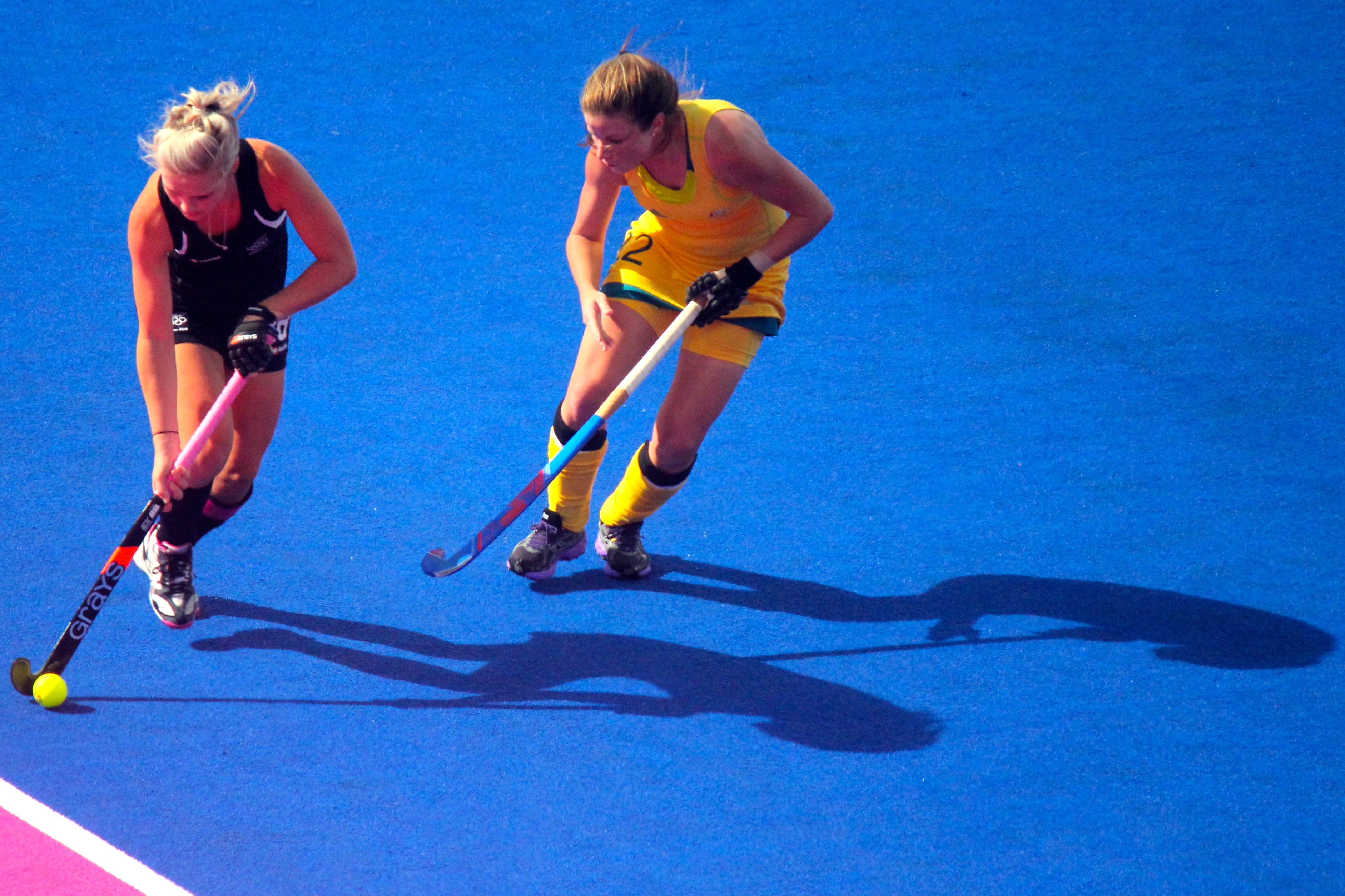 Kate Jenner (right)